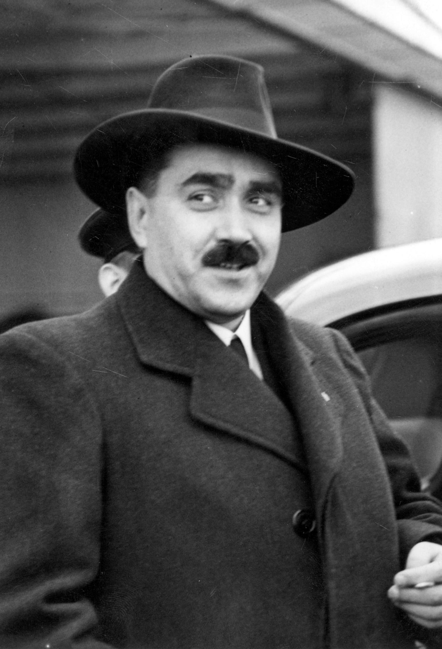 Karol Sidor am Flughafen in Warschau